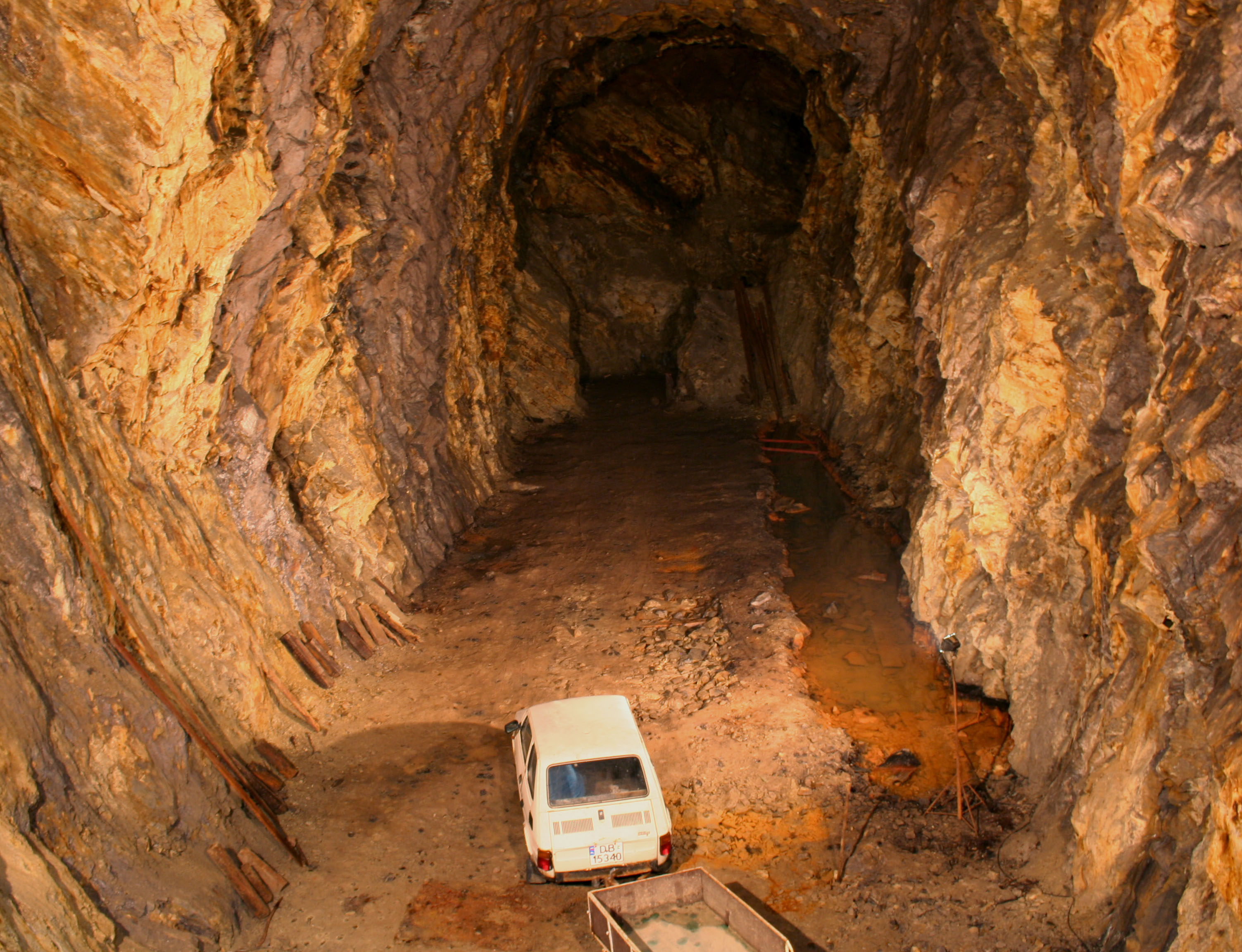 Kompleks Riese w Górach Sowich, Walim - Rzeczka, sztolnie z "Maluchem", dzięki któremu wywożony jest gruz podczas eksploatacji zasypanych przejść